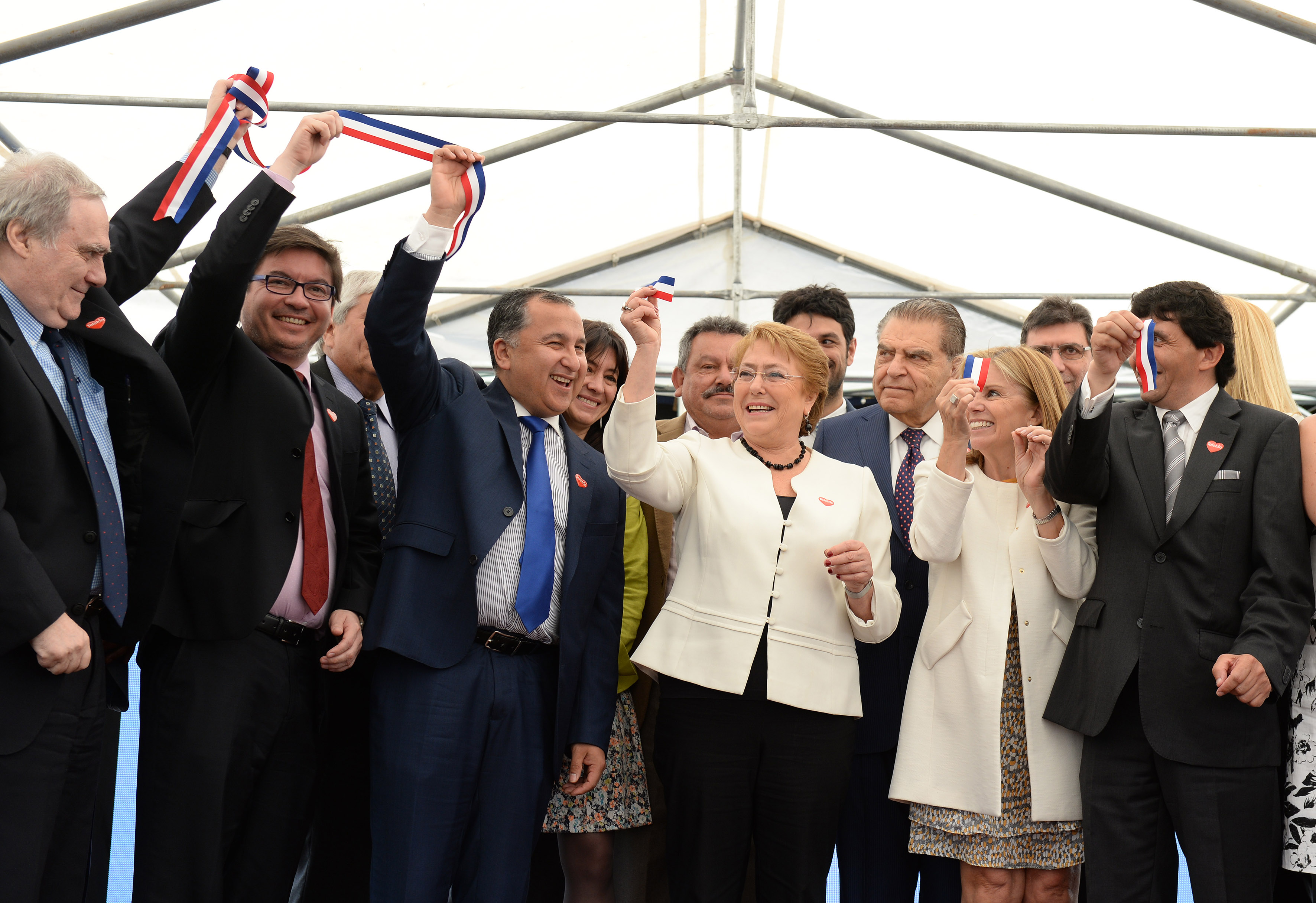 Gobierno de Chile